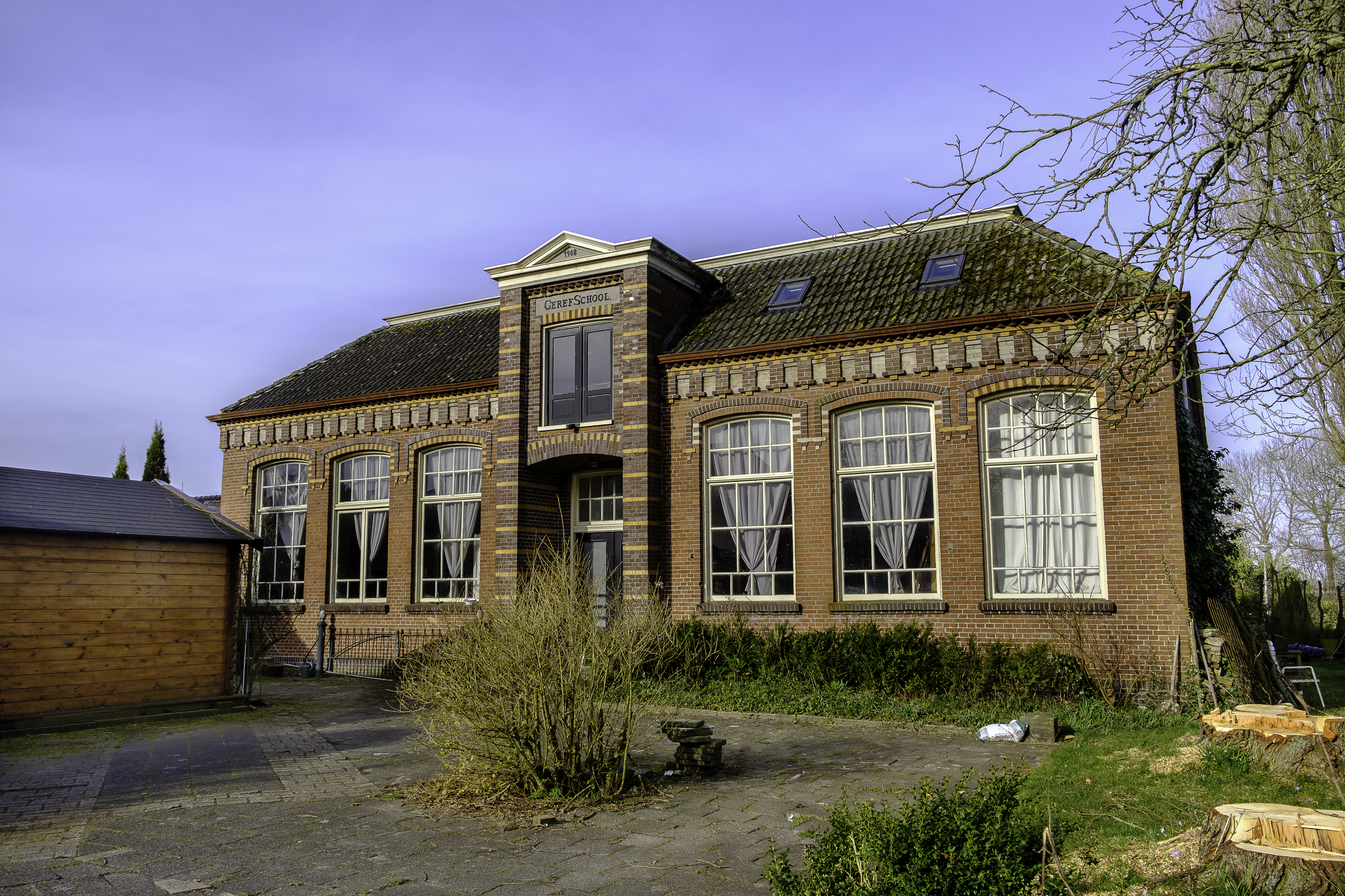 De oude gereformeerde lagere school van Baflo uit 1908